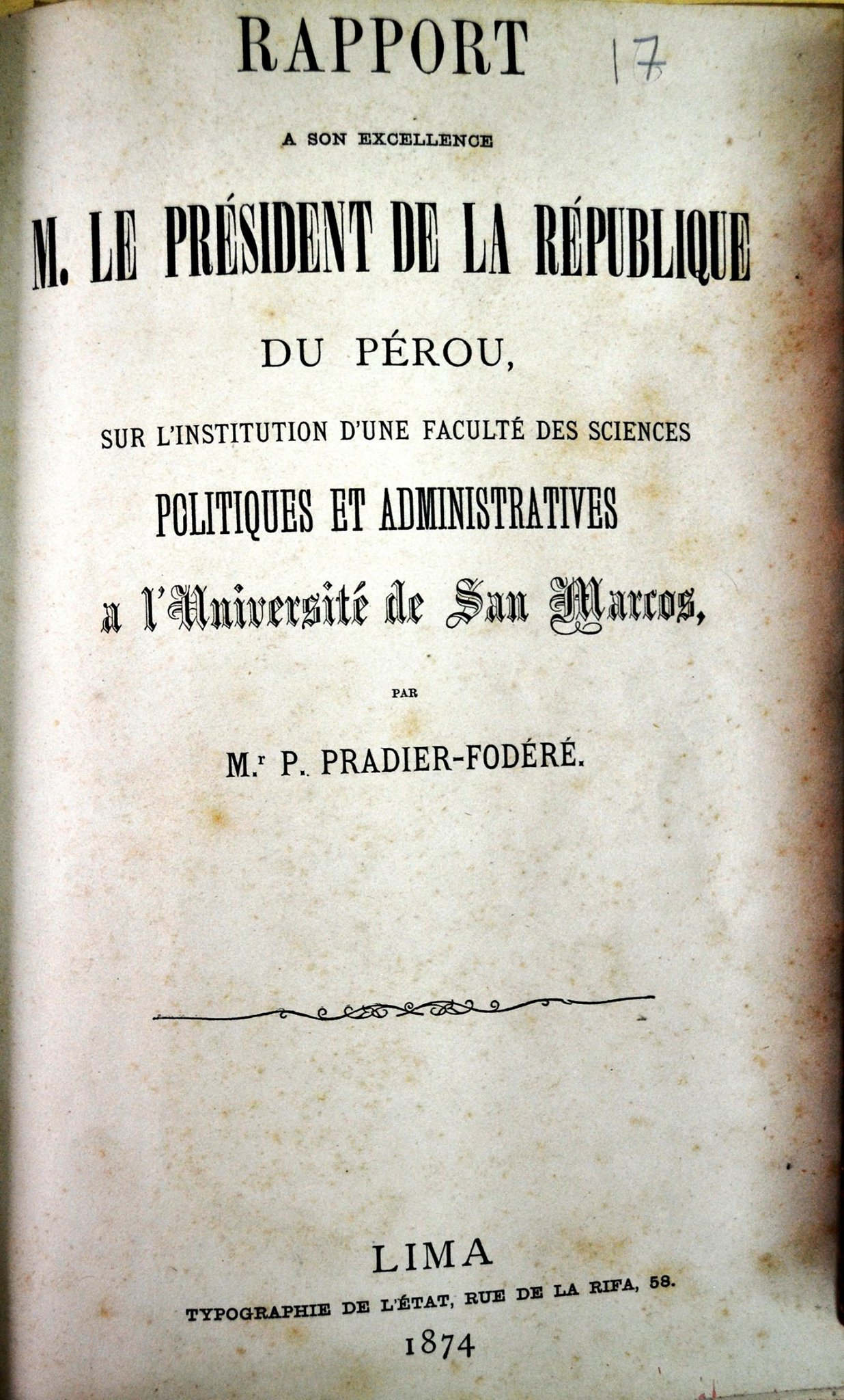 ...a l'Université de San Marcos Reporte en francés hecho por el profesor Paul Pradier-Fodéré en Lima, el año de 1874. Que sugiere la creación de una Facultad de Ciencias Políticas y Administrativas en la Universidad de San Marcos. Este documento se remitió a su excelencia, el presidente de la República del Perú, quien a la sazón fuera Manuel Pardo y Lavalle. A la postre, este documento tendría un fuerte impacto en la reorganización de la educación superior que se plasmó en el Nuevo Reglamento General de Instrucción Pública de 1876.